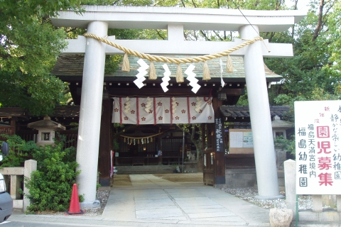 福島天満宮。南側鳥居から撮影。